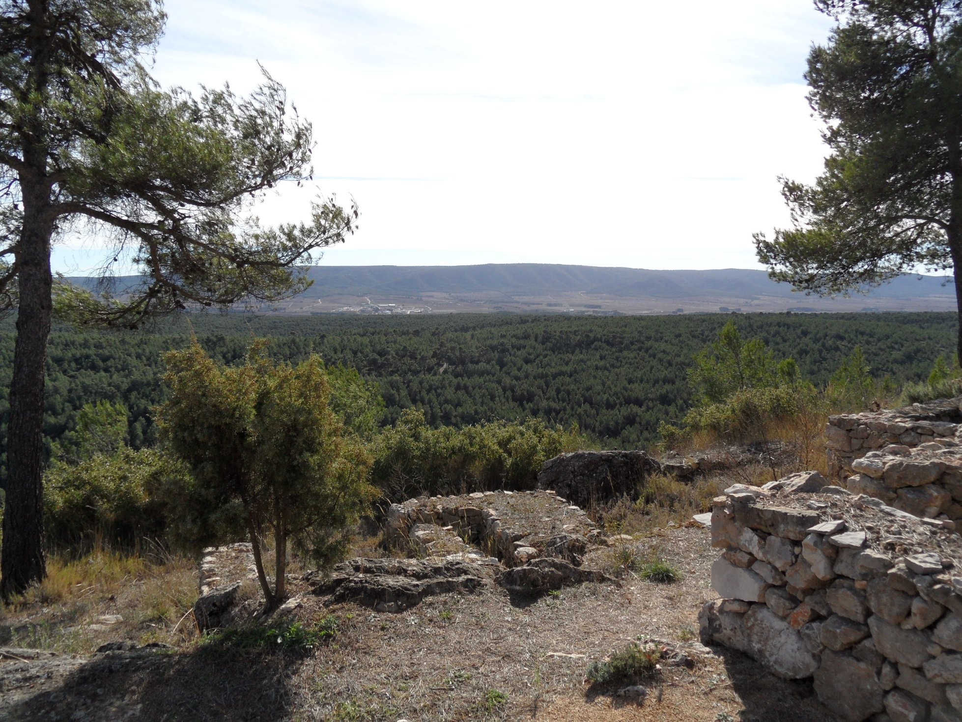 Els Alforins des del centre del poblat.